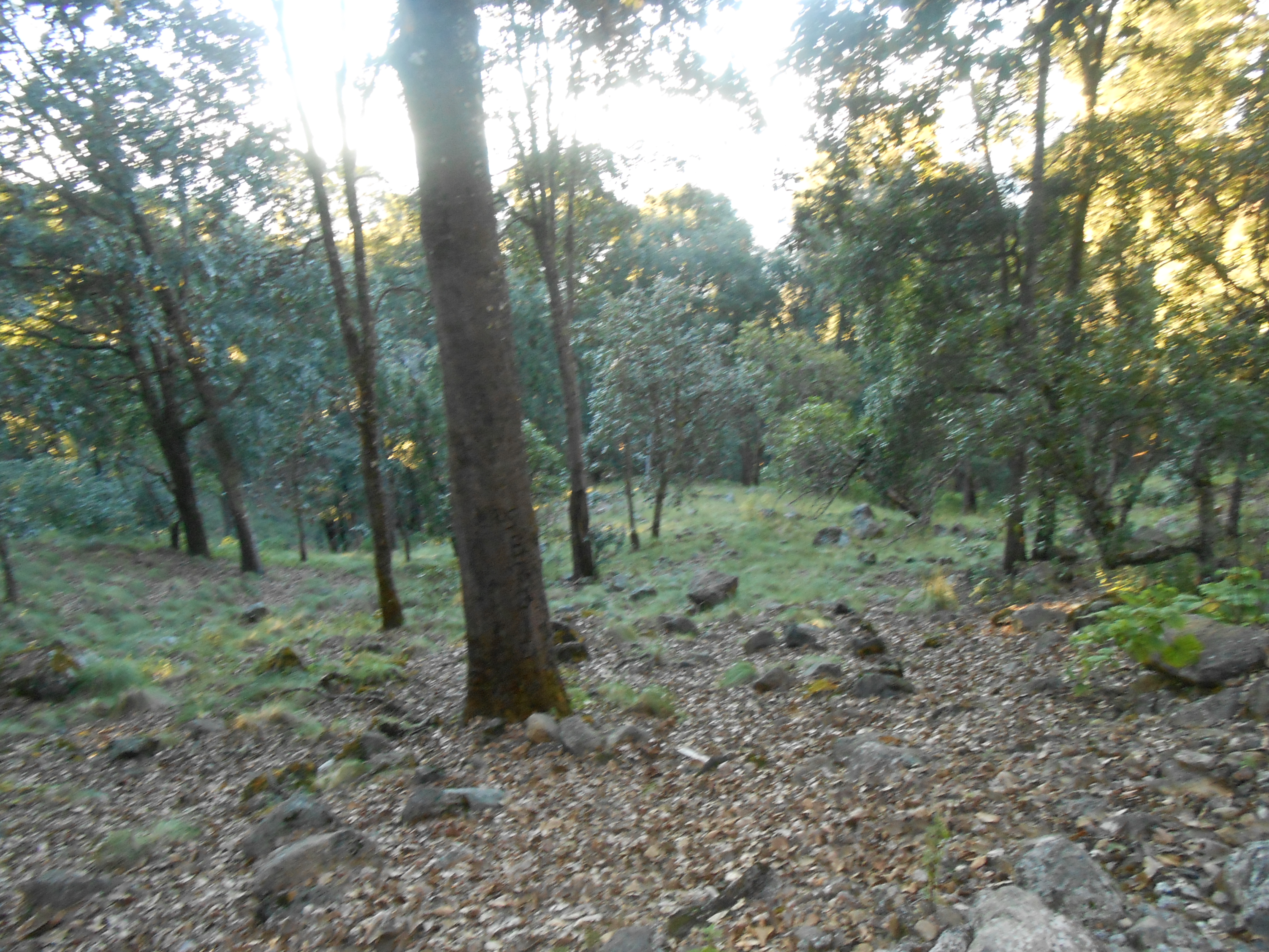 Bosque endémico del volcán y único en Jalisco.